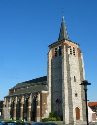 Esquerchin l'église